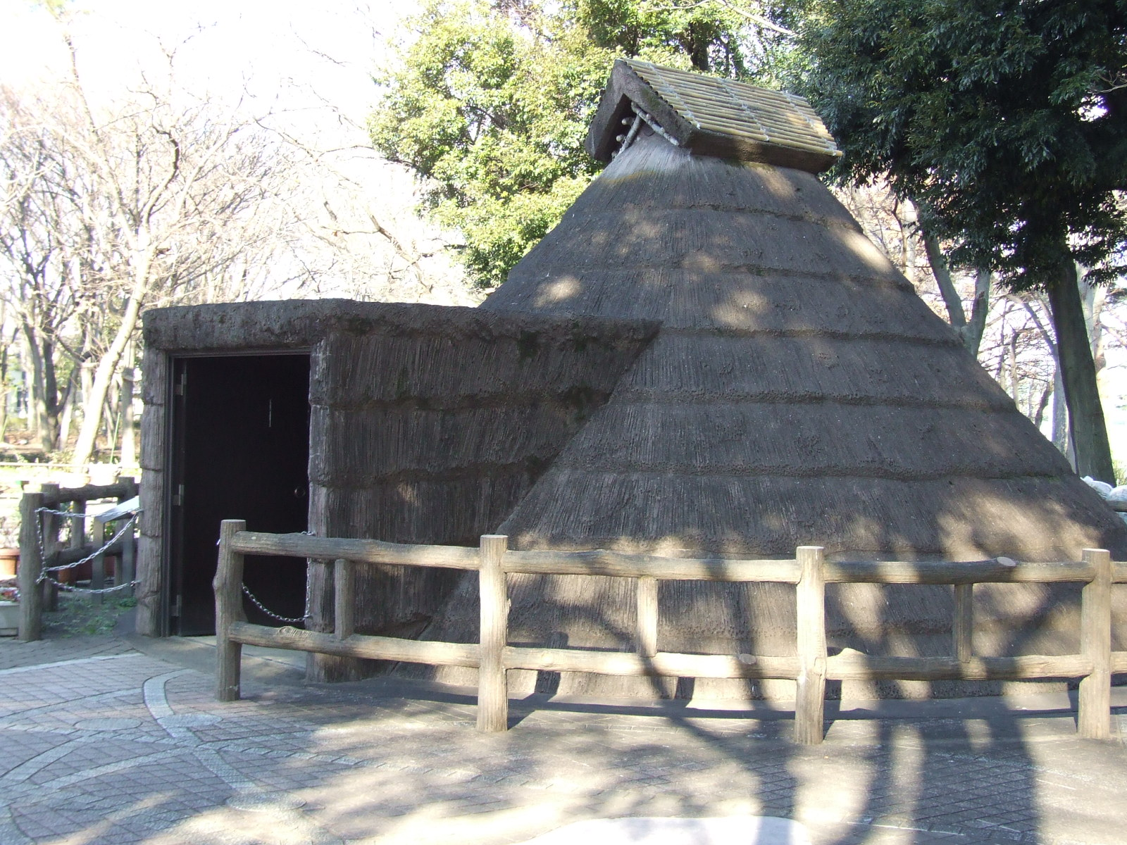 塚山公園(杉並区)に復元された縄文時代の竪穴式住居